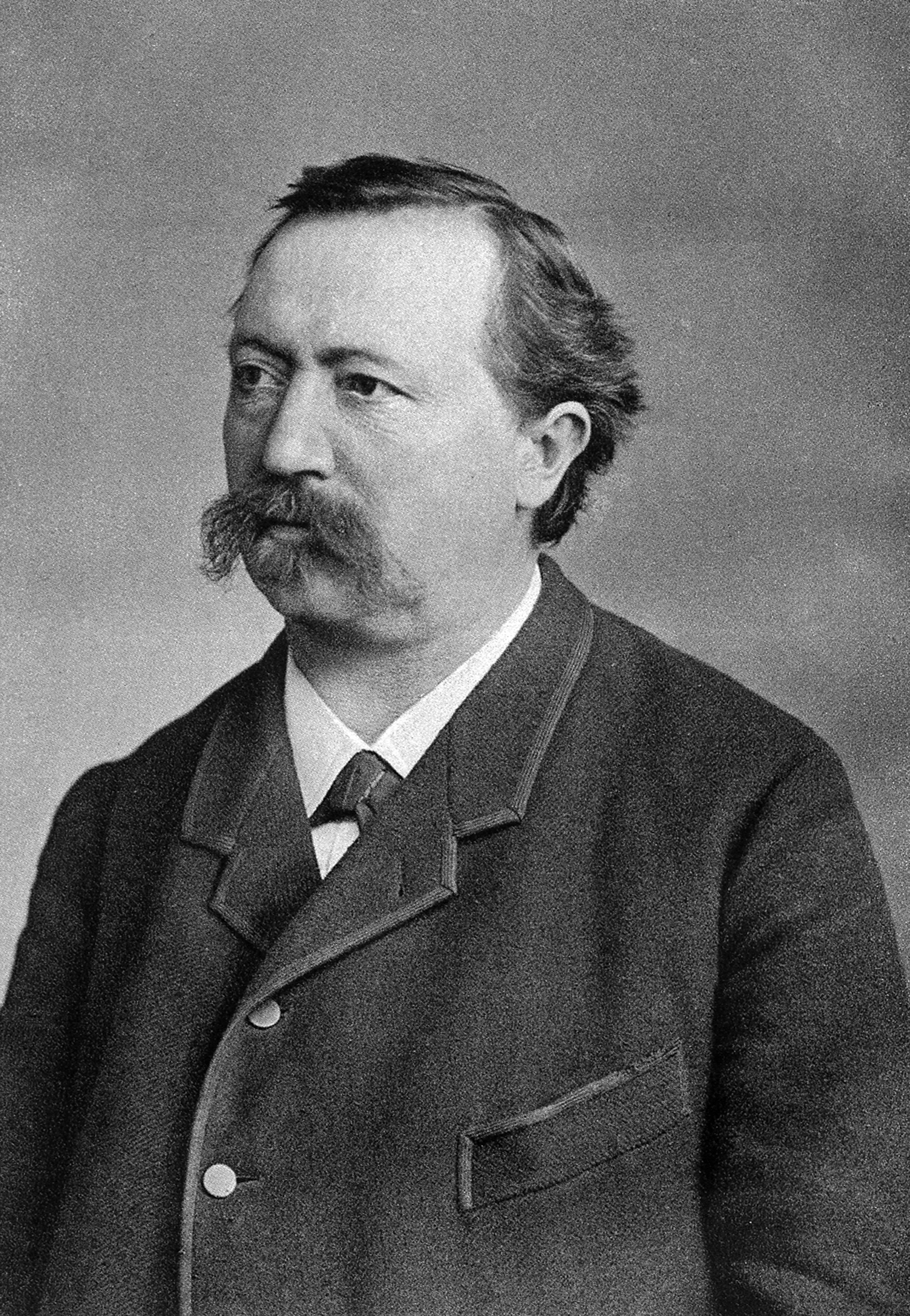 Der Dichter Giacun Hasper Muoth (1844-1906) um 1890